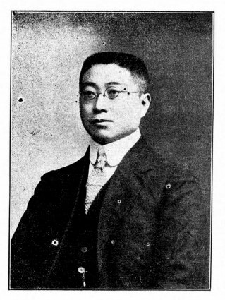 中文（台灣）: 中華民國國會議員